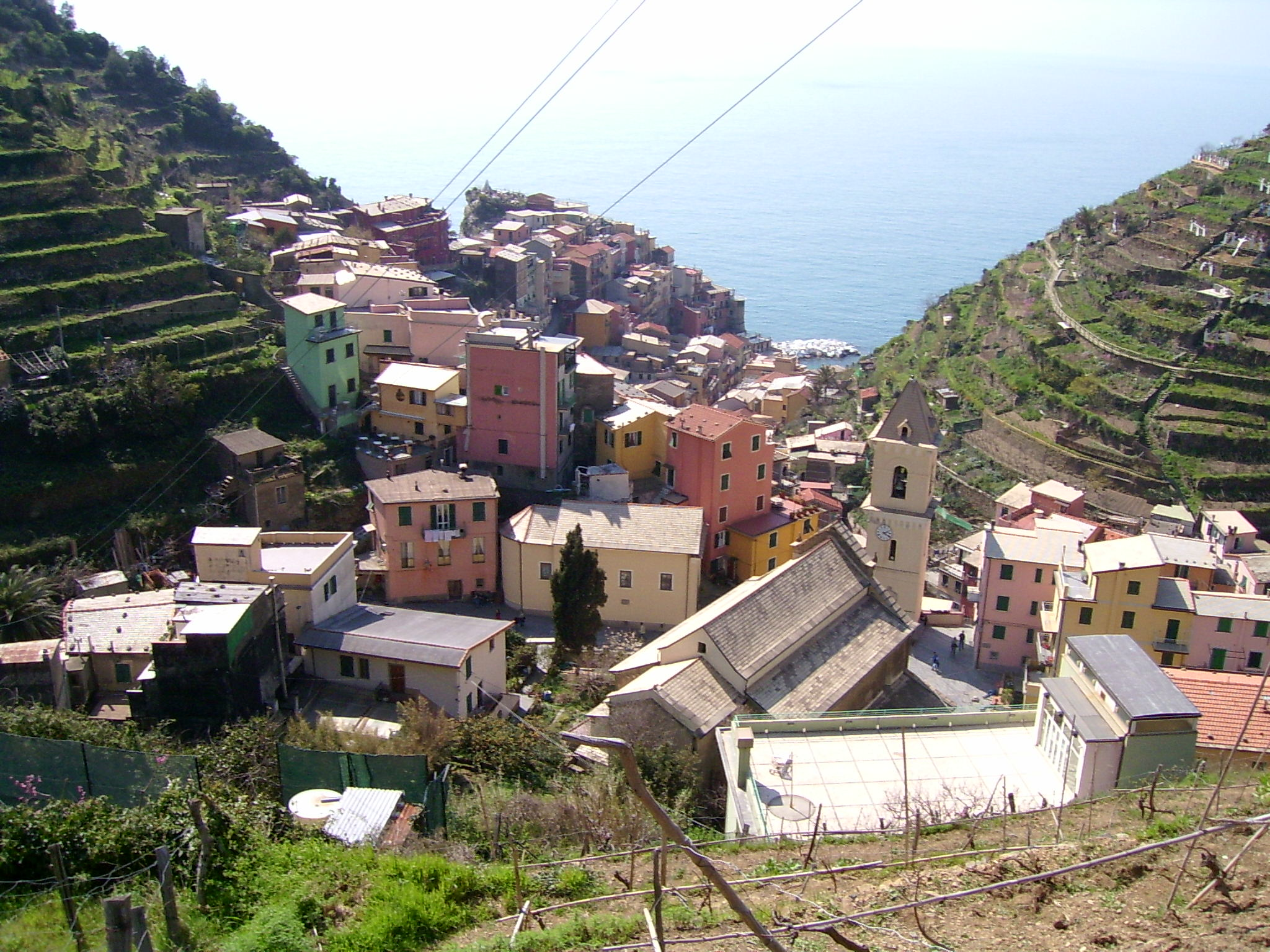 Manarola (Liguria, Italia)